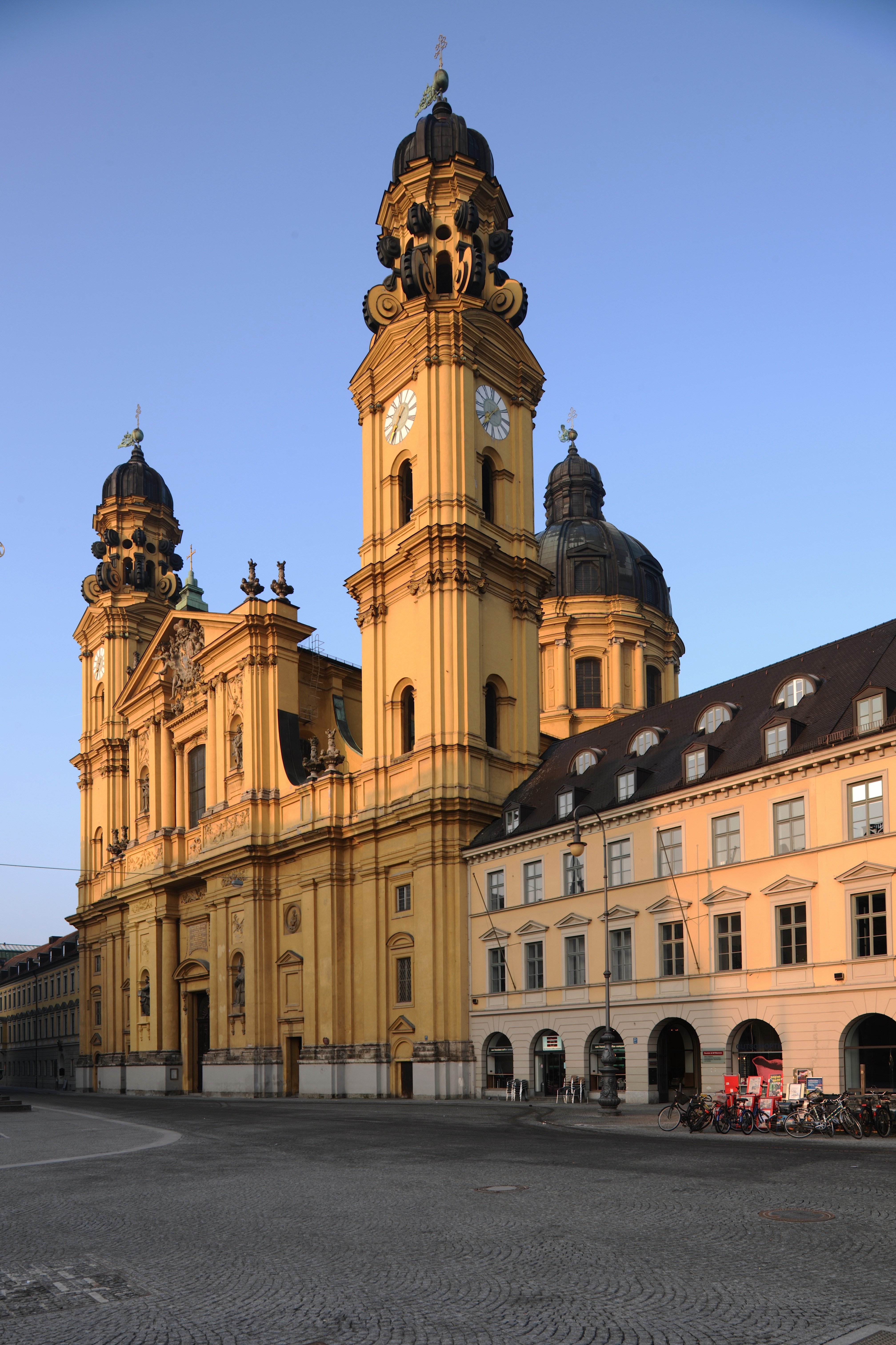 München. Fassadenansicht Theatinerkirche.